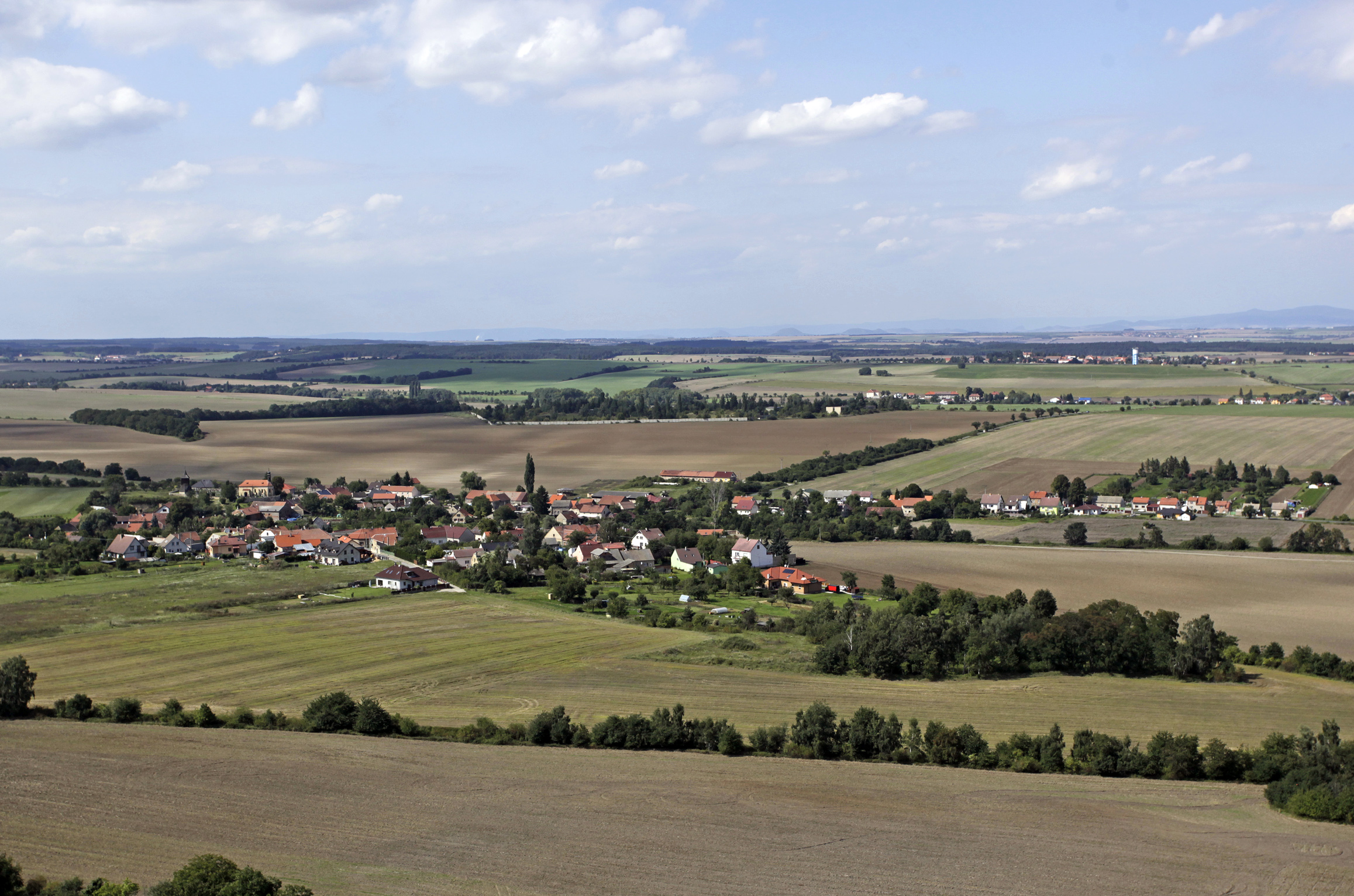 Obec Přelíc v okrese Kladno, Česká Republika